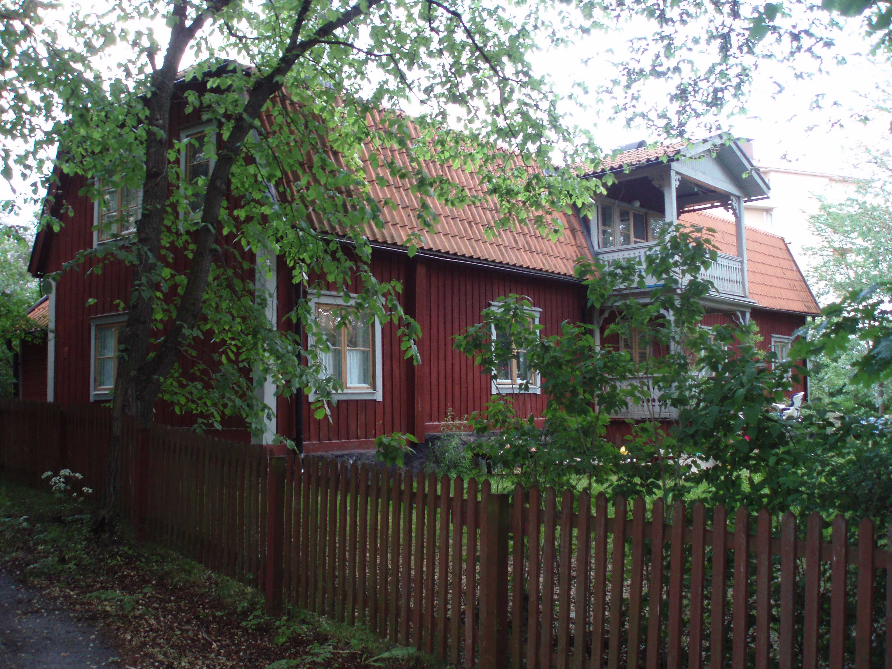 Skärmarbrinks gård, Stockholm, summer 2006. Photograph: User:Cucumber